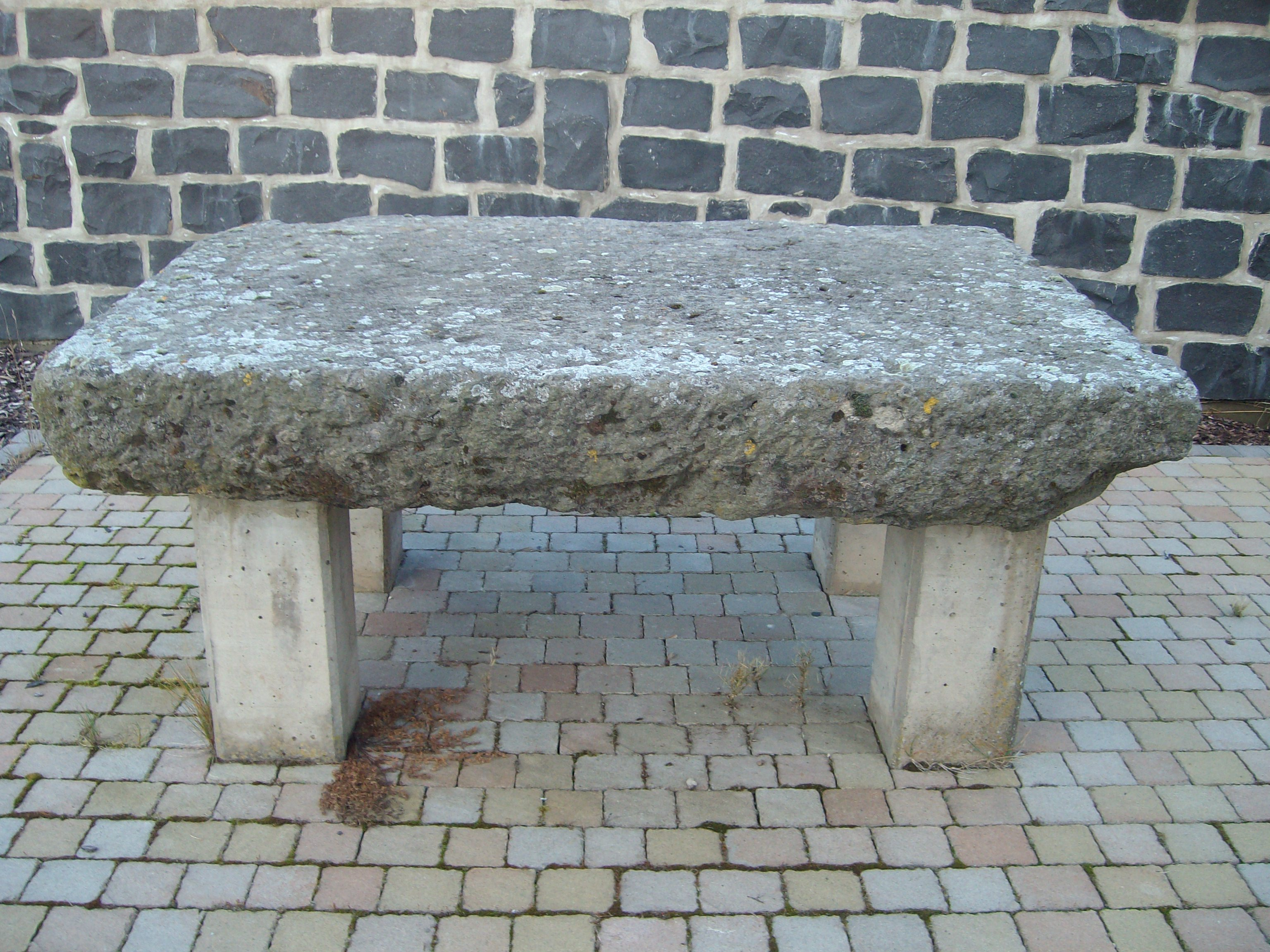 Altarplatte vor der Evangelischen Kirche Wetterfeld, Laubach, Landkreis Gießen, Hessen, Deutschland